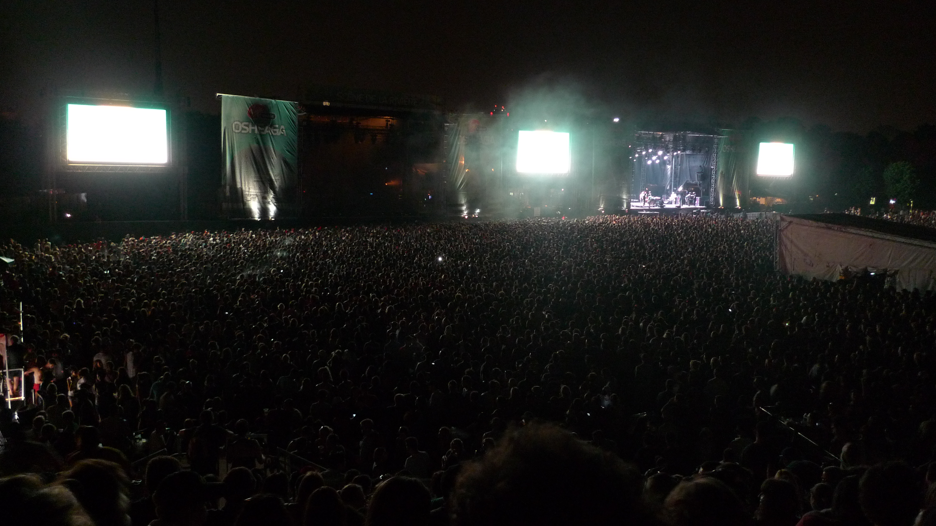 pre snoop